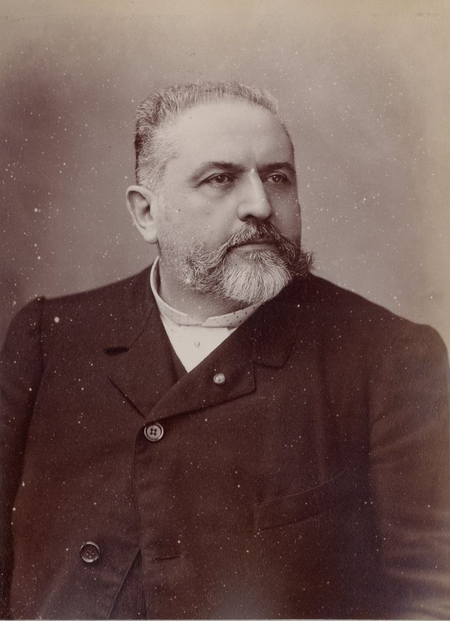 Eugène Crosti , professeur au Conservatoire